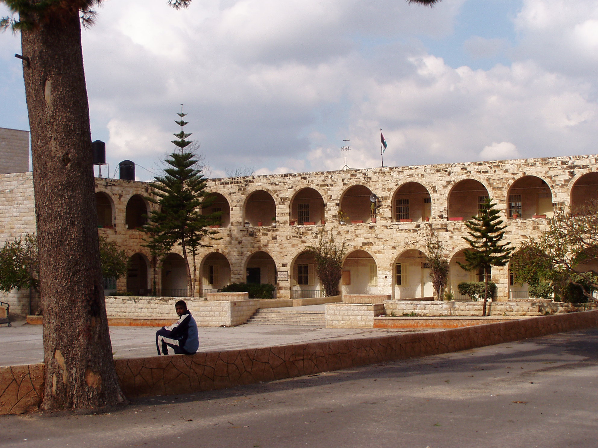 Tulkarm, Al-Adawiah school